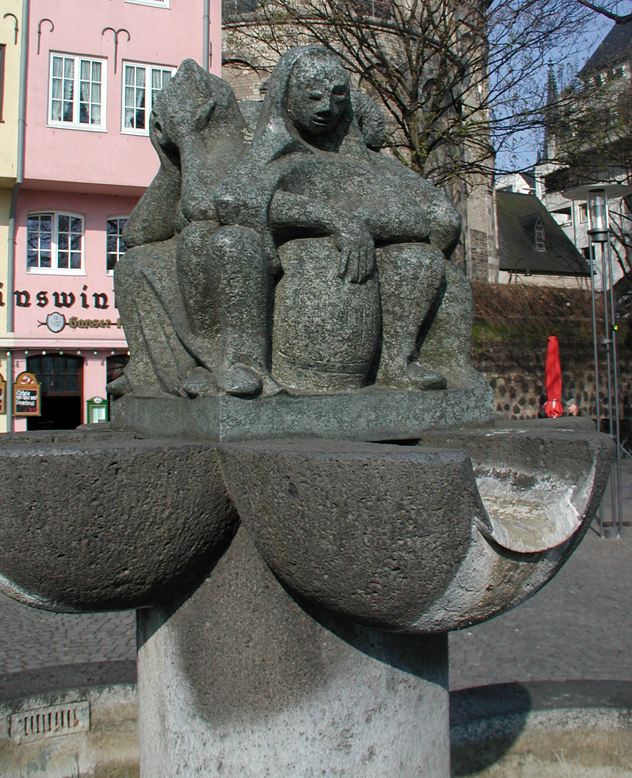 Kölner Altstadt, Fischmarkt. Fischweiberbrunnen. Die Skulptur ist ein Werk des Bildhauers Rainer Walk.